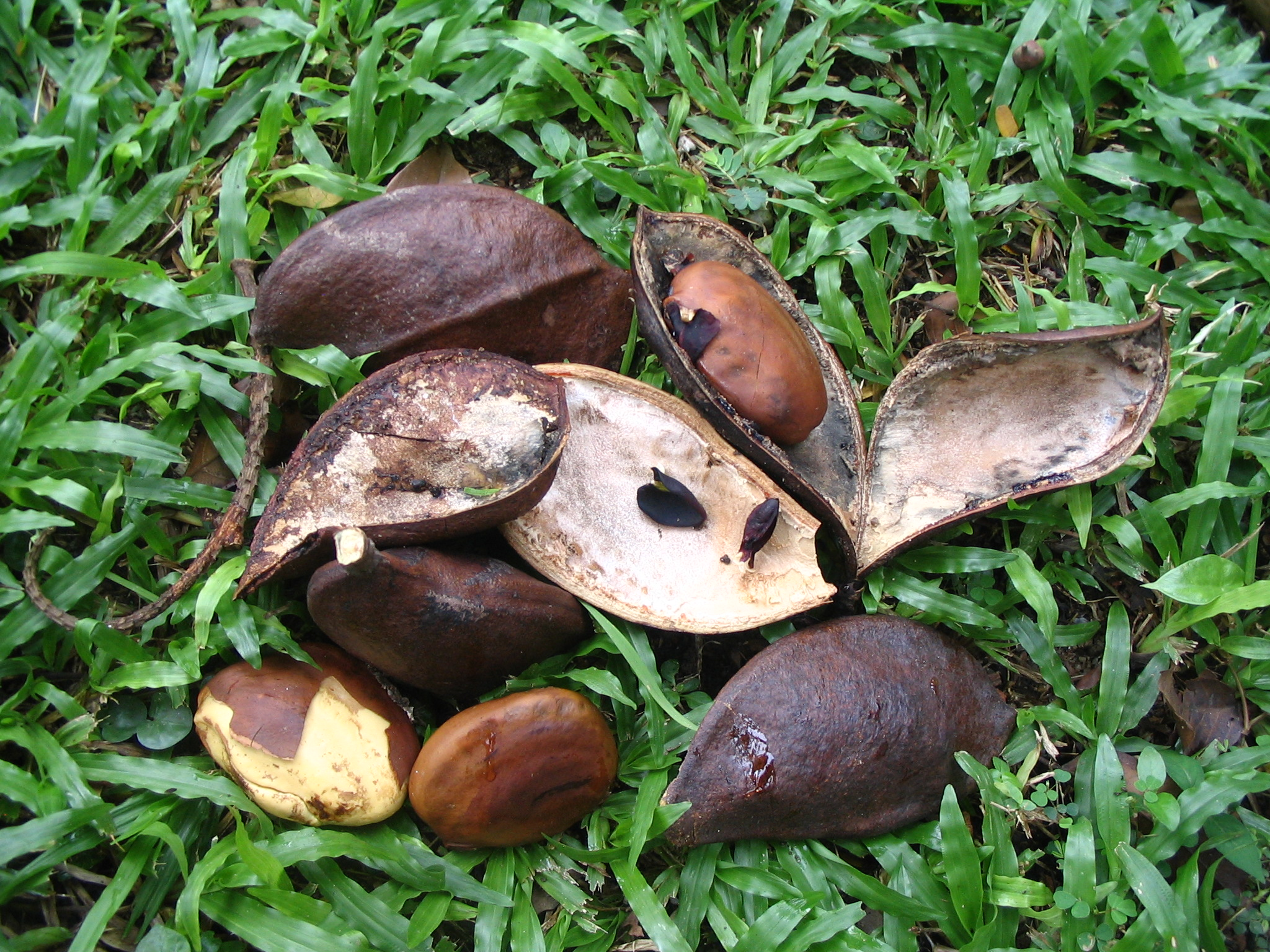 Callerya atropurpurea - Millettia atropurpurea - Gousses et graines - Bikit nanas Forest Reserve - Kuala Lumpur